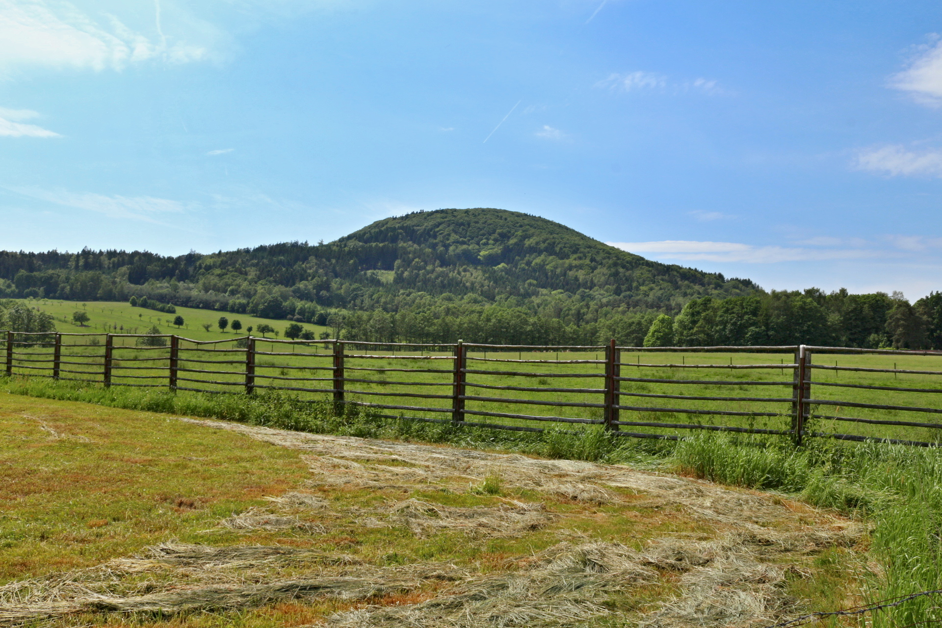 Heřmanice v Podještědí